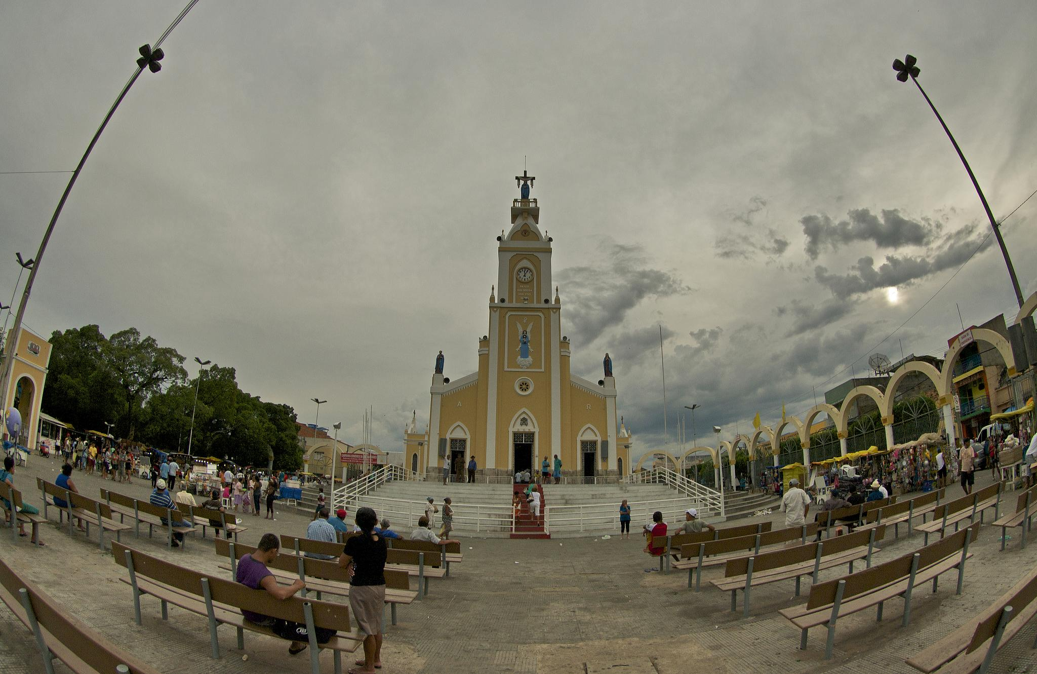 Na terra do Padim